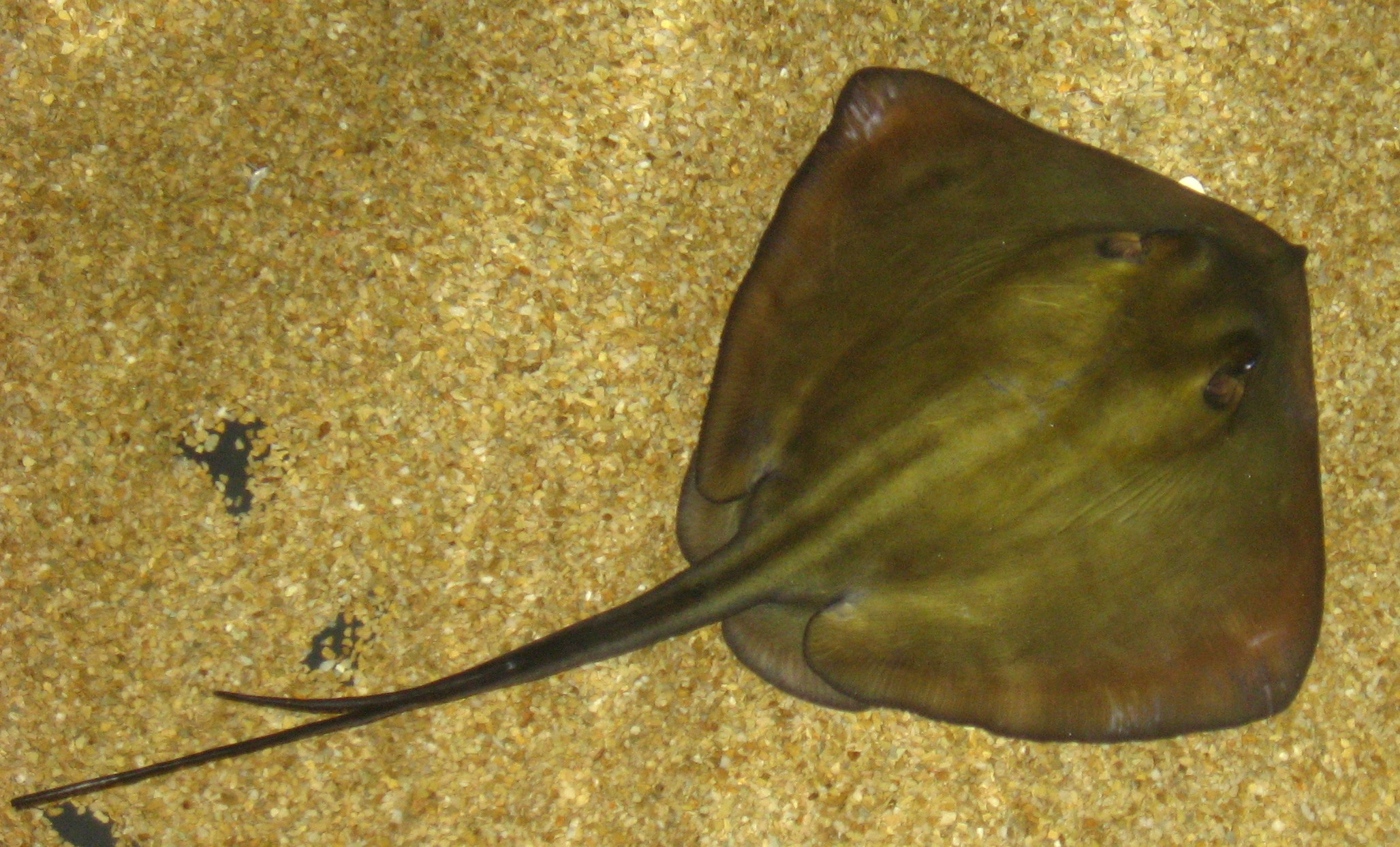 Dasyatis pastinaca in Nausicaä Centre National de la Mer